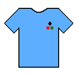 Uniforme del Colegio Experimental Paraguay-Brasil (CEPB) de Asunción, Paraguay.